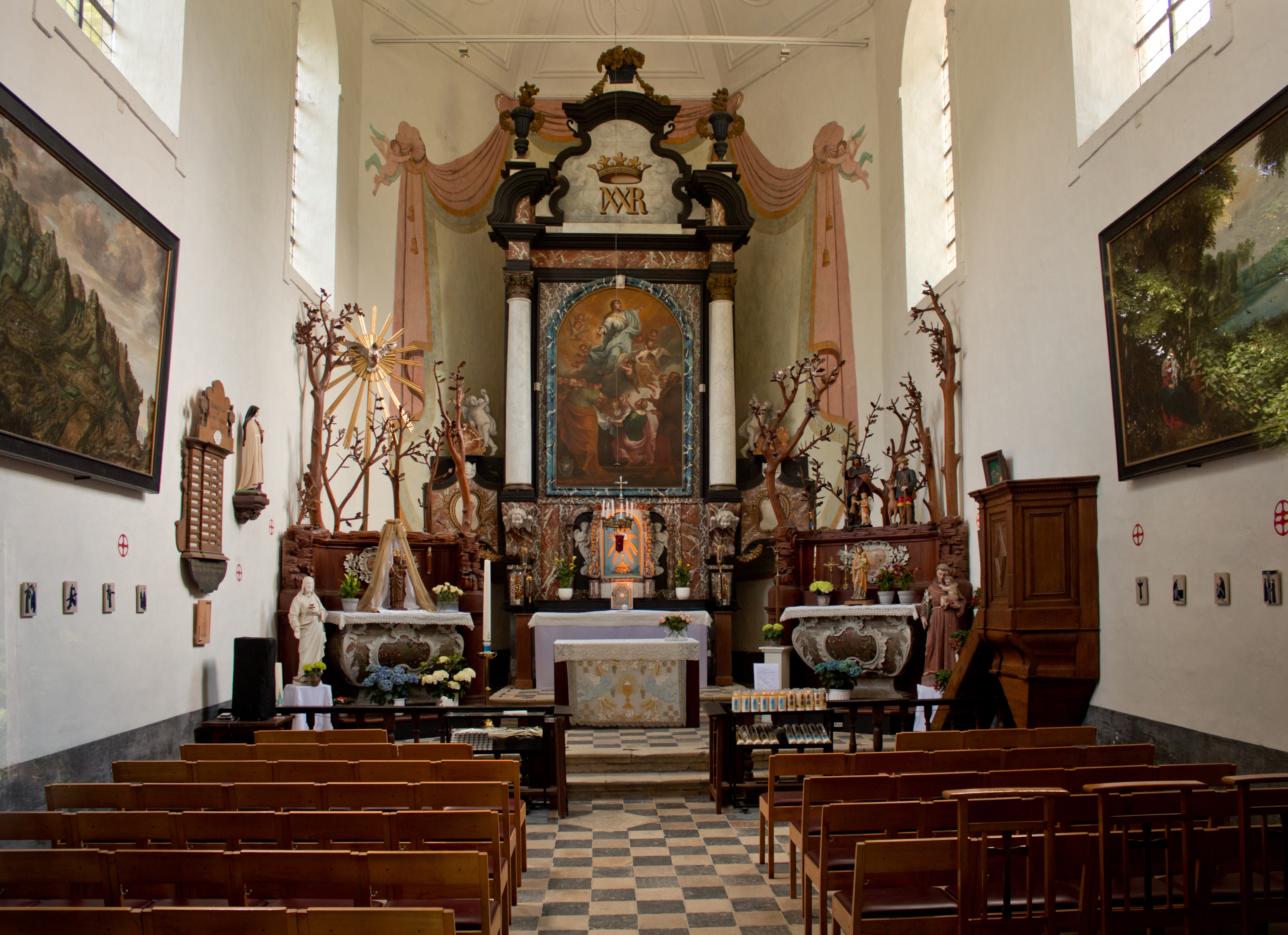 Kapel van Onze-Lieve-Vrouw-van-Steenbergen, Oud Heverlee.